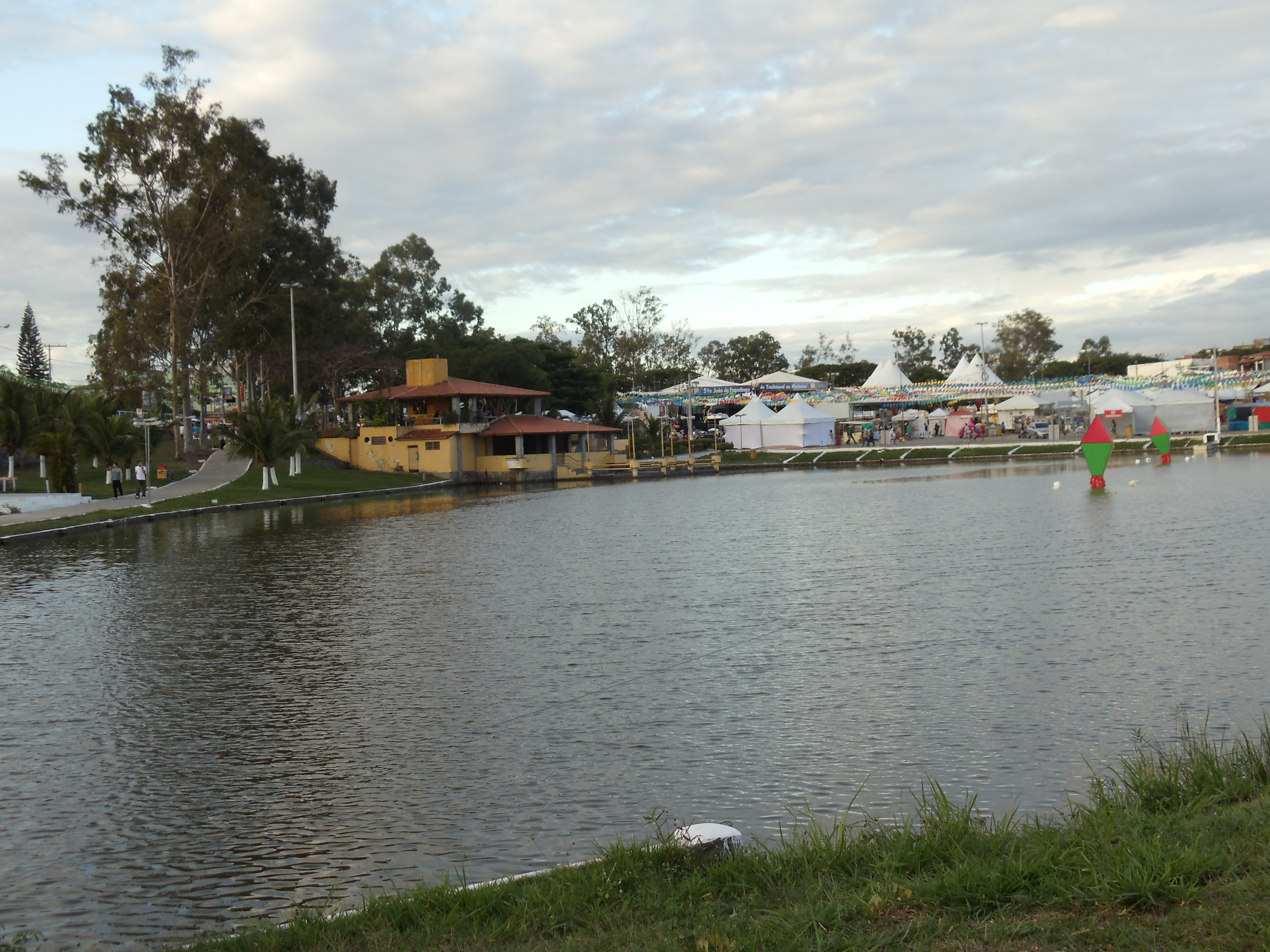 Parque Poliesportivo da Lagoa no município brasileiro de Itapetinga, Bahia.